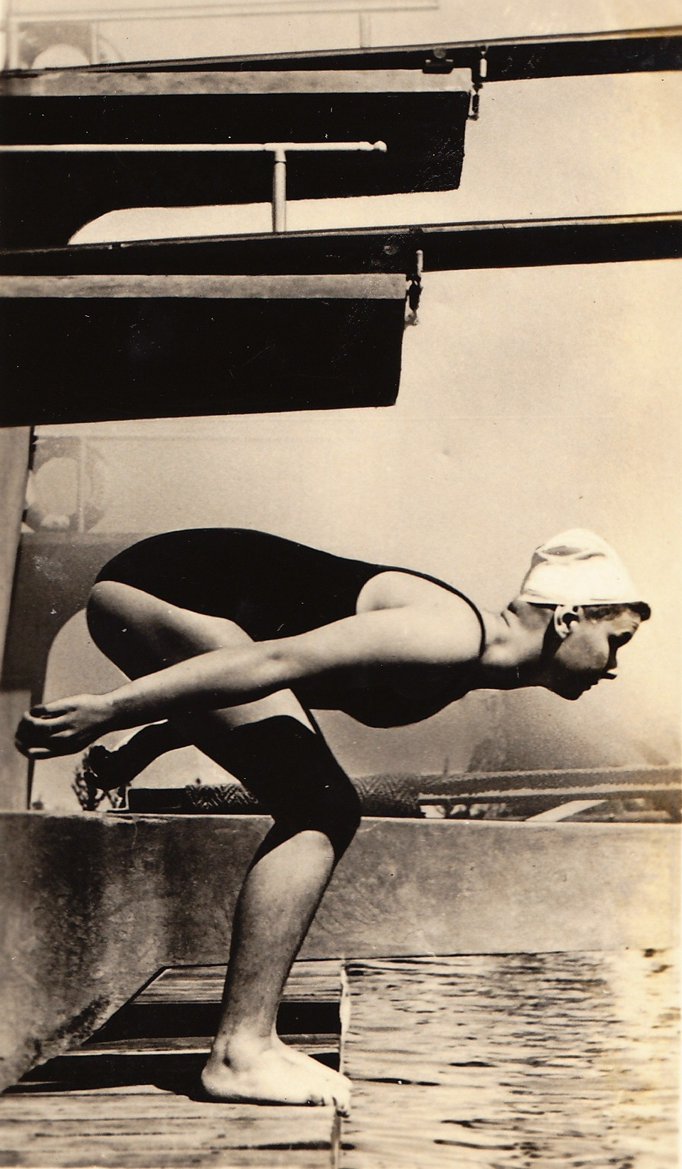 Trude Malcorps, een van de "upper ten" onder zwemsters.